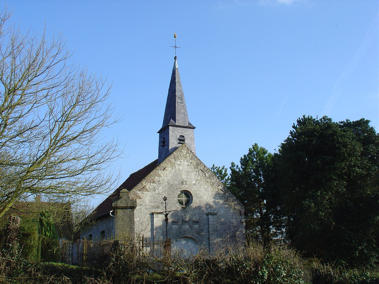 Église de Monchel-sur-Canche